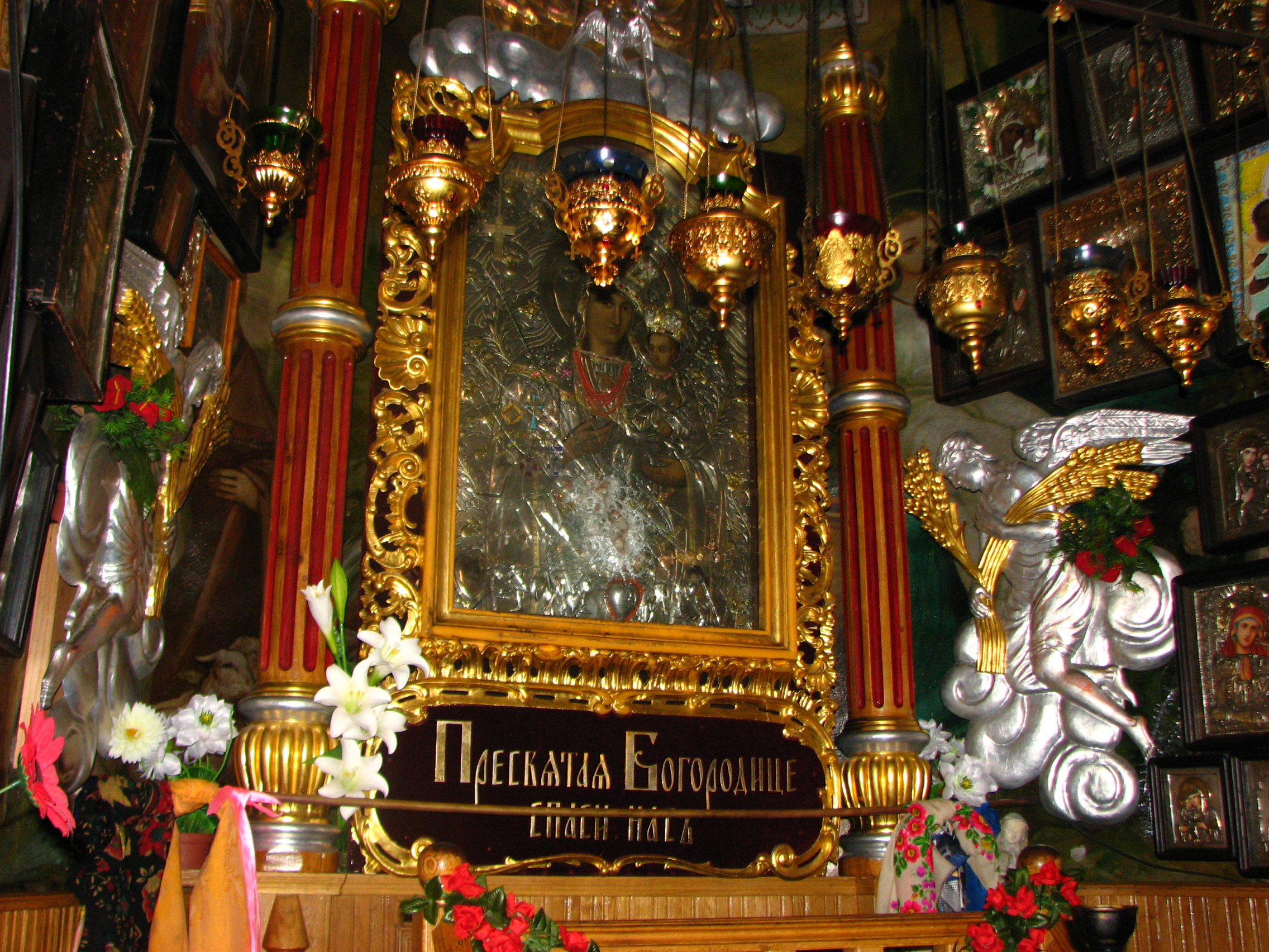 Тернопільська чудотворна ікона Божої Матері розташована у церкві Різдва Христового на вул. Руській зліва від іконостасу.